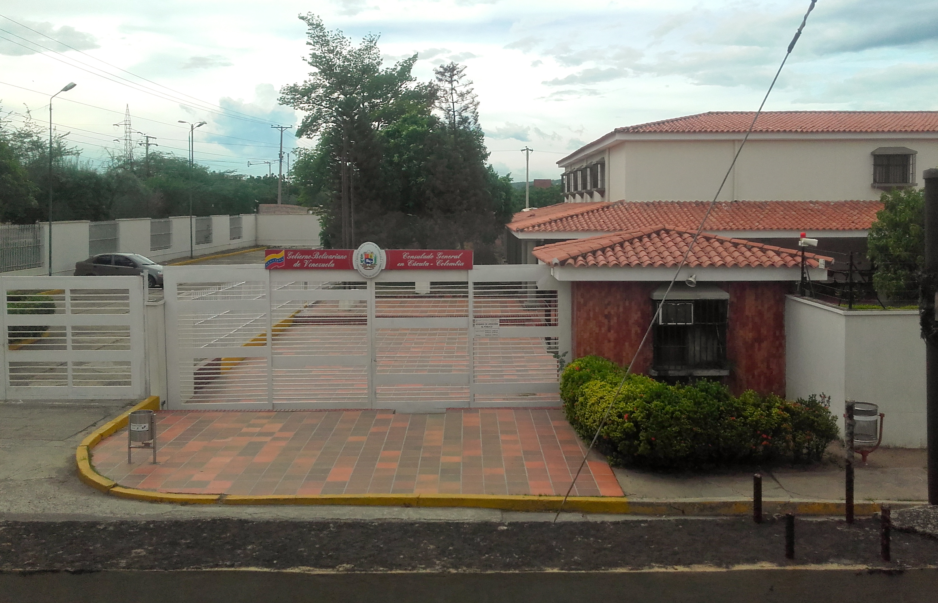 Consulado de Venezuela en Cúcuta, Colombia